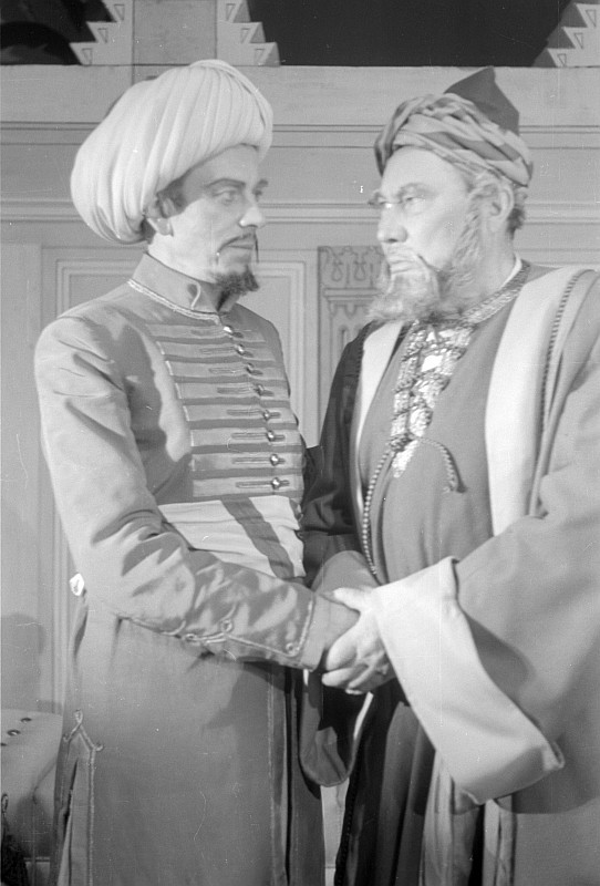 Original image description from the Deutsche Fotothek Paul Wegener in der Titelrolle, Agathe Poschmann als Recha, Kai Möller als Sultan Saladin und Eduard von Winterstein als Klosterbruder